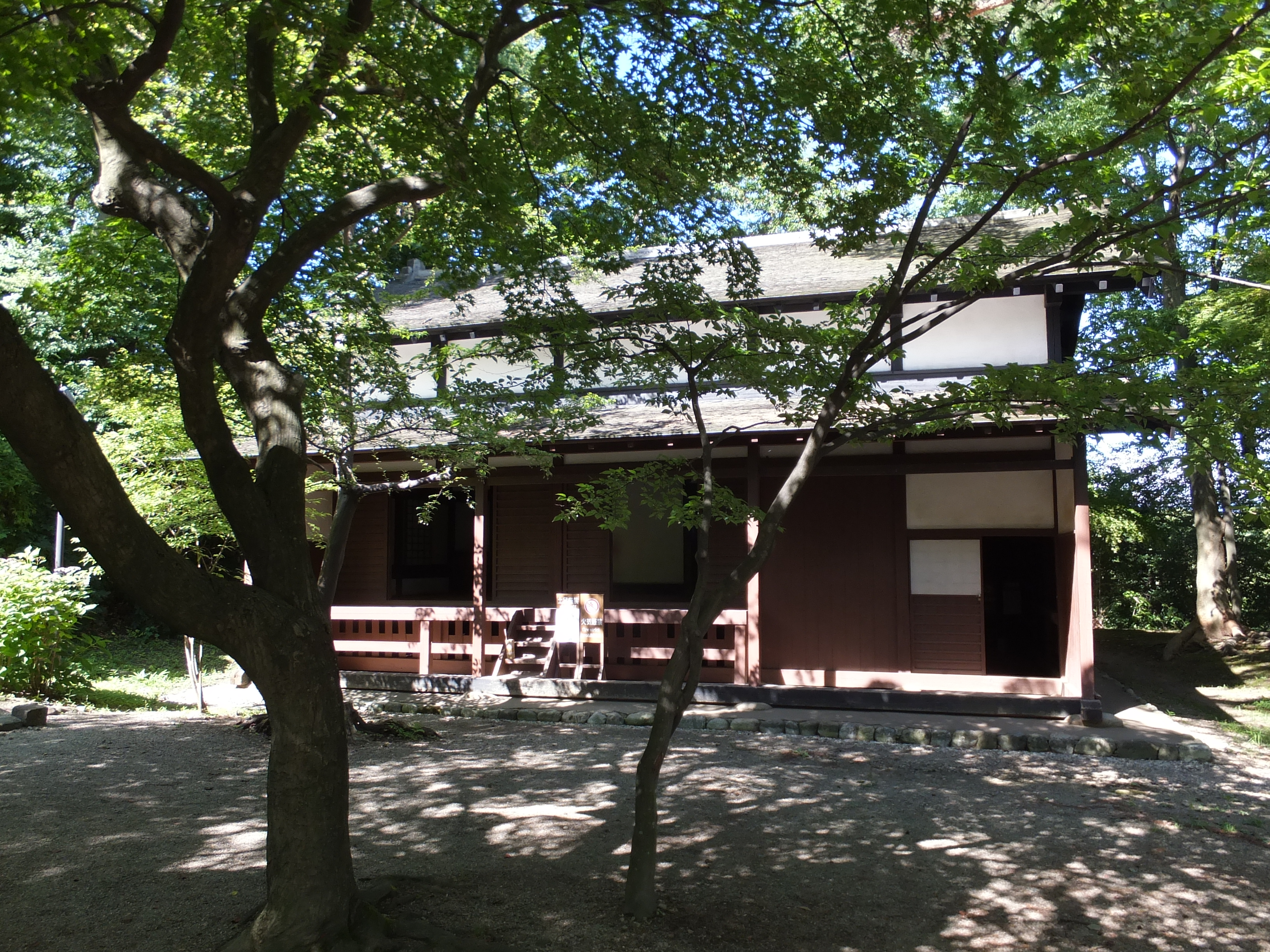 久保田城御物頭御番所。城内に残る唯一の江戸時代の遺構である。